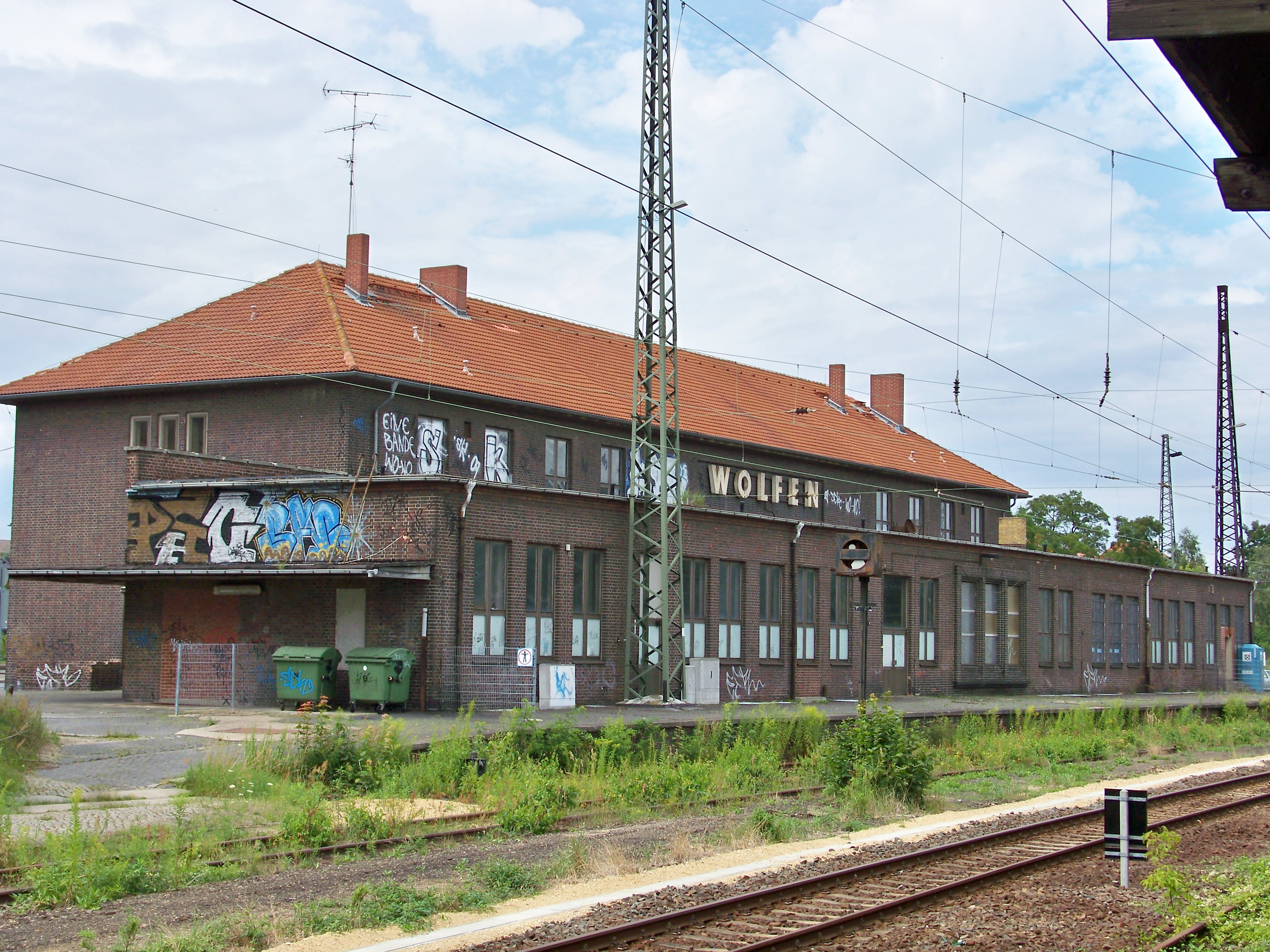 Empfangsgebäude des Bahnhofs Wolfen (Bitterfeld) von der Gleisseite